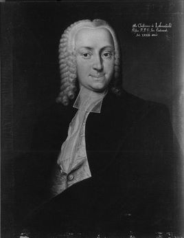 Gemälde in der Professorengalerie Tübingen